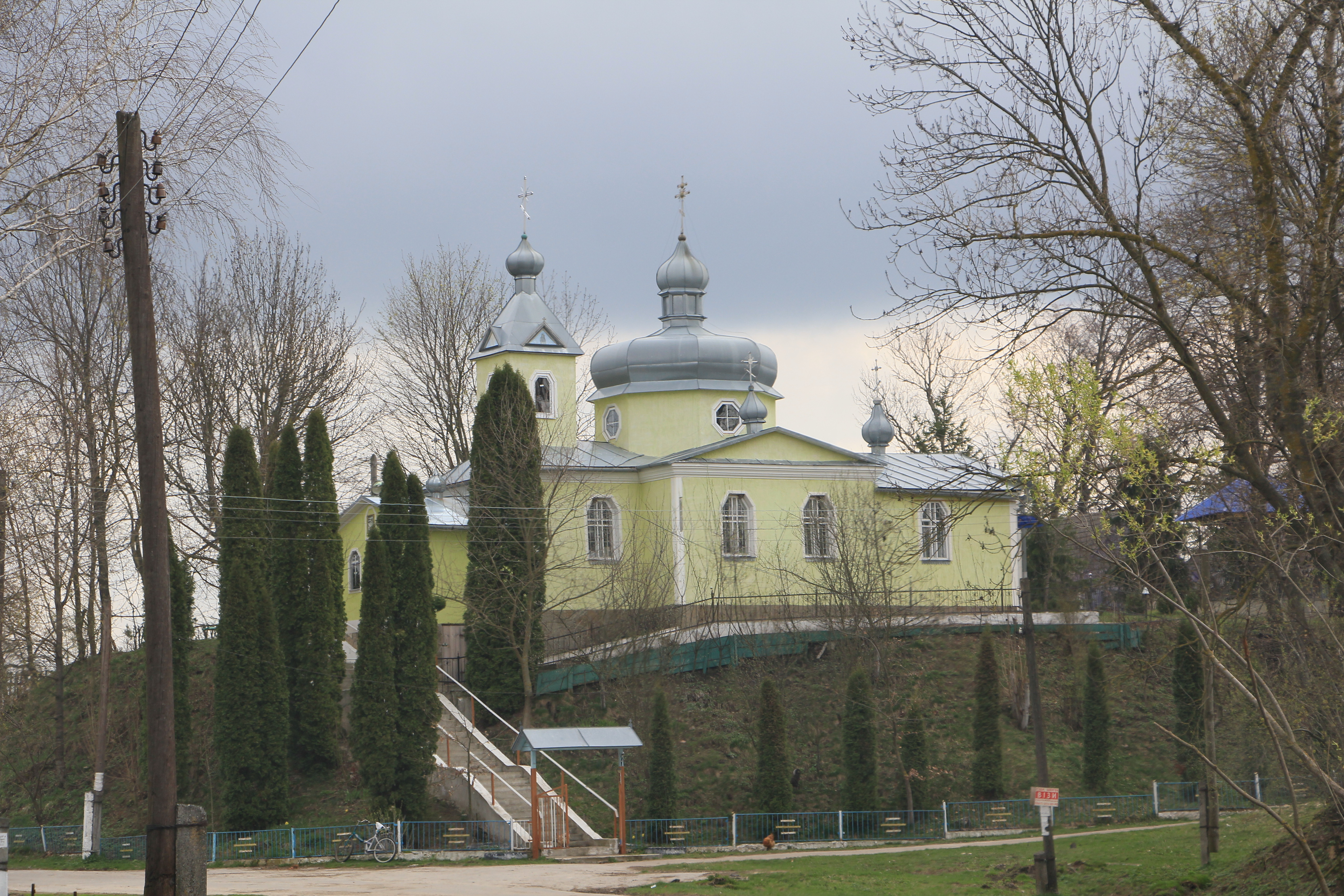 Церква в селі Богданівка Кременецького району, Тернопільської області